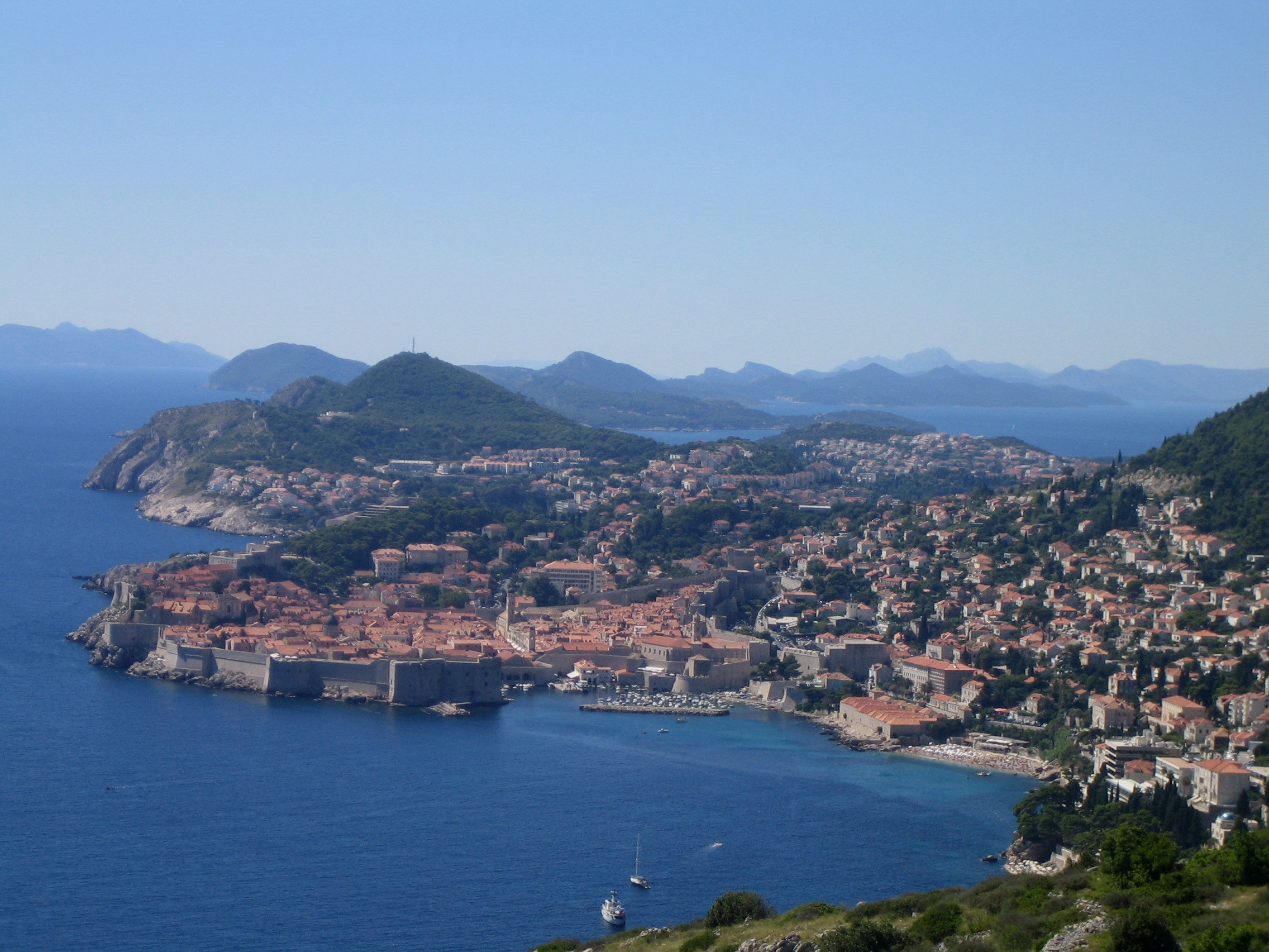 Vista aérea de La ciudad de Dubrovnik en Croacia.